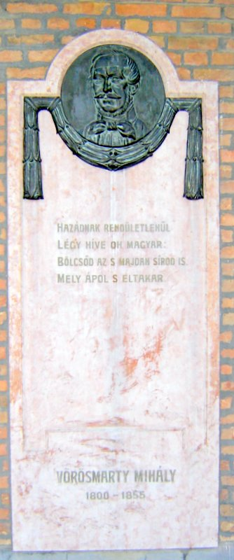 Vörösmarty Mihály (1800-1855) domborműve a szegedi Nemzeti Emlékcsarnokban a Dóm tér keleti oldalán az árkádok alatt (Taiszer János alkotása)